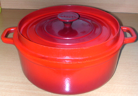 Cocotte (ustensile de cuisine)